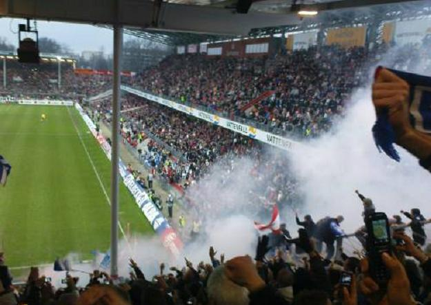 Hertha vs Energie Cottbus 2008/09